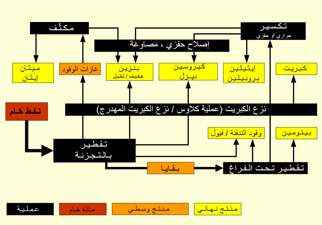 مخطّط مبسّط لمعالجة النفط.الخام والمنتجات المستحصلة